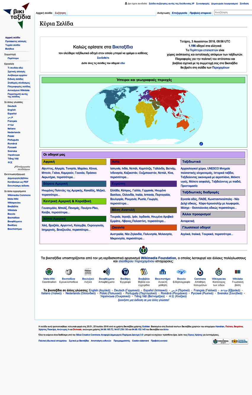 نماگرفت از ویکی سفر یونانی